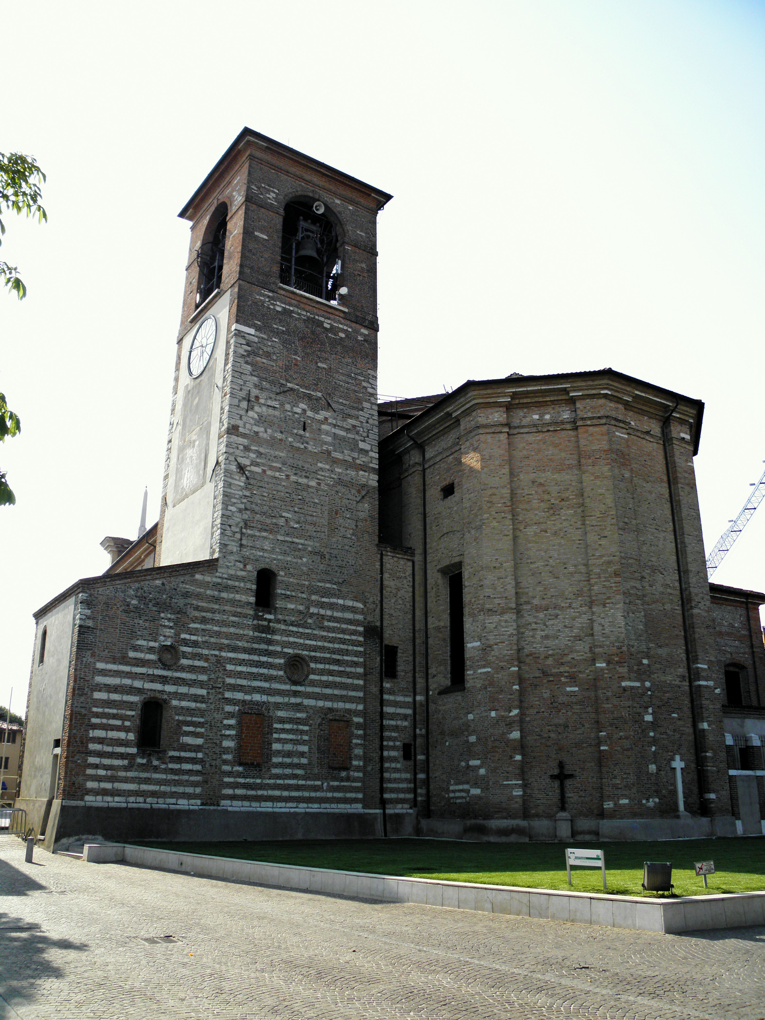 Ghedi, Chiesa parrocchiale di Santa Maria Assunta: campanile ed abside.